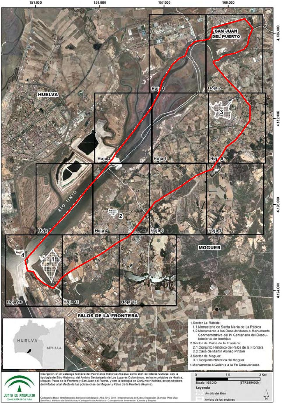 Plano delimitación Bien de Interés cultural de los Lugares Colombinos. Junta de Andalucía. Boletín Oficial de la Junta de Andalucía de 25 de octubre 2016. Número 205 página 93.